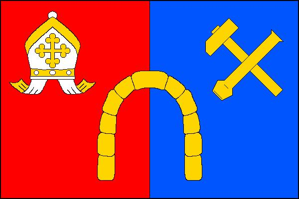 Vlajka obce Mikulovice (okres Jeseník)